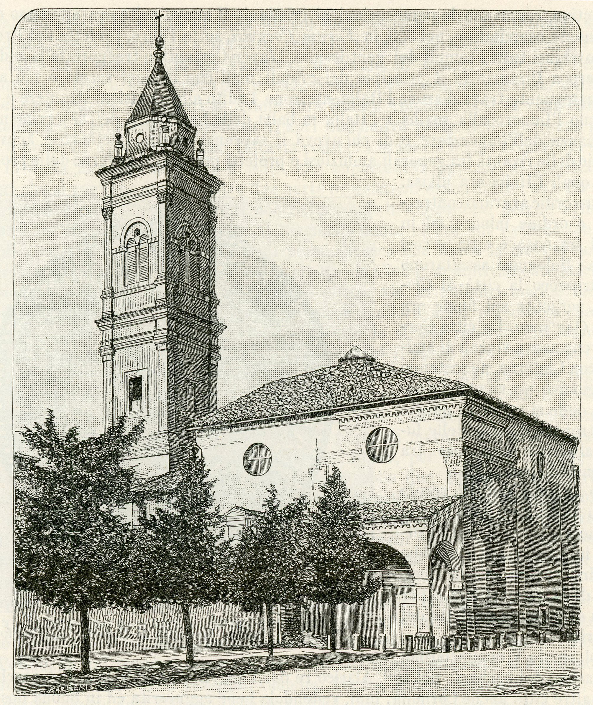 Imola (dintorni): Santuario della madonna del Piratello (xilografia di Giuseppe Barberis).